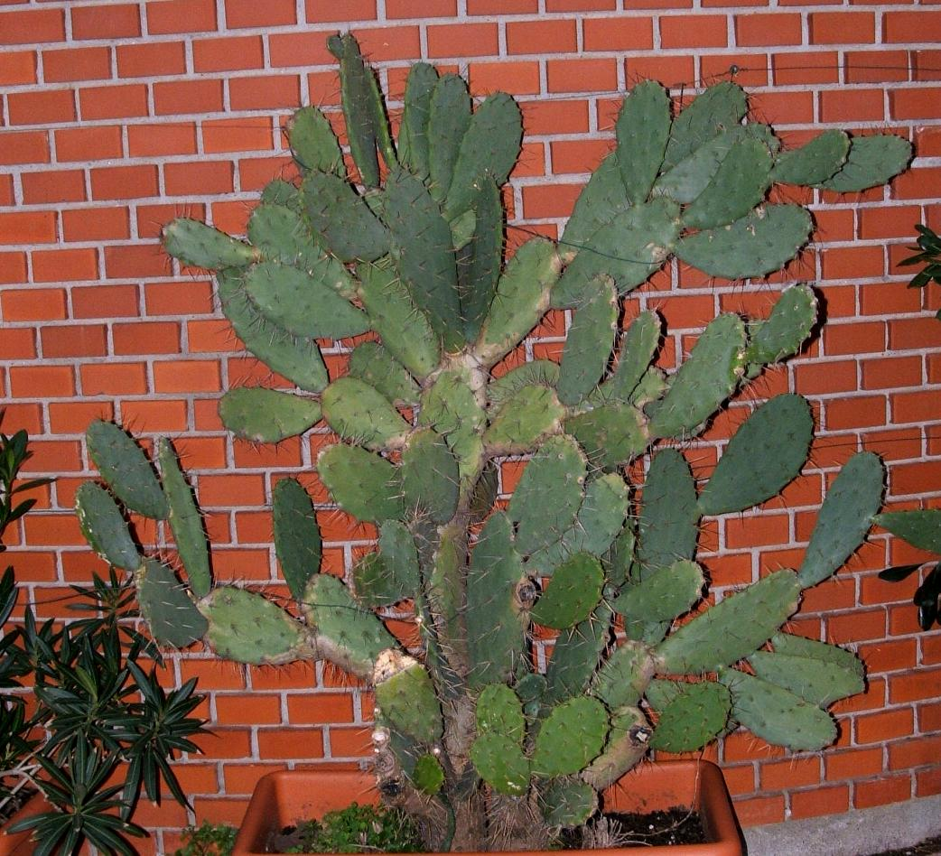 Fico d'India - Mia foto - Twice25 (ri-cicciati - stai al passo, segui il flusso) 18px|Icona del wiki-love 15:17, Gen 20, 2005 (UTC)